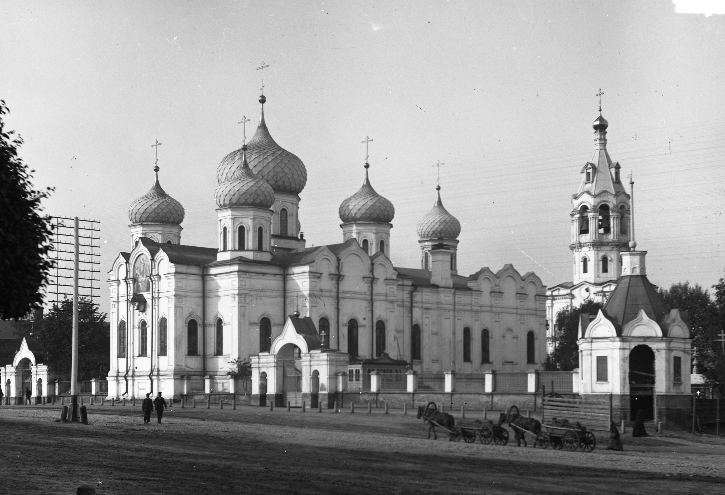 Вознесенский храм (Иваново), 1900-е